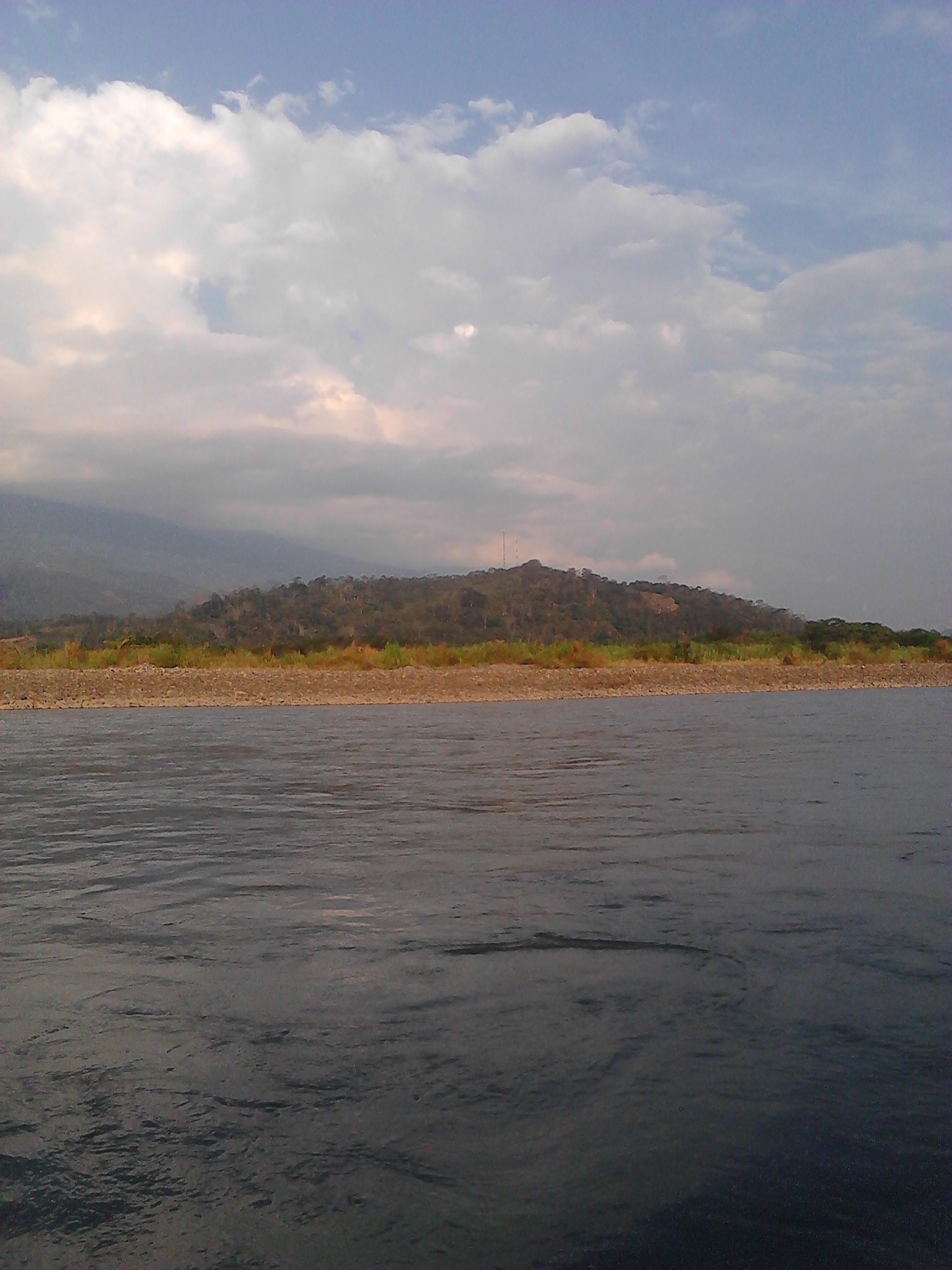 Vista del Río Ene